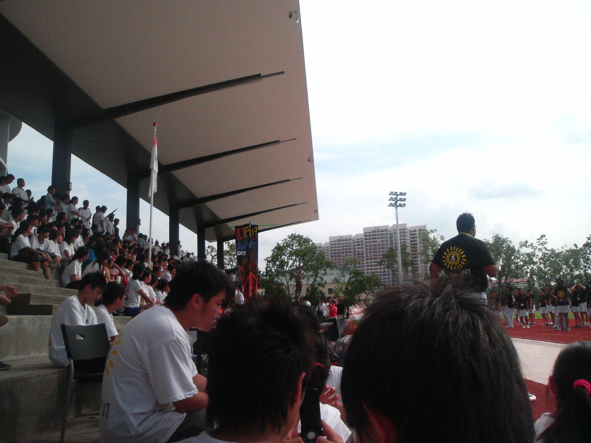 Millennia Institute during Orientation "De Novo" 2007